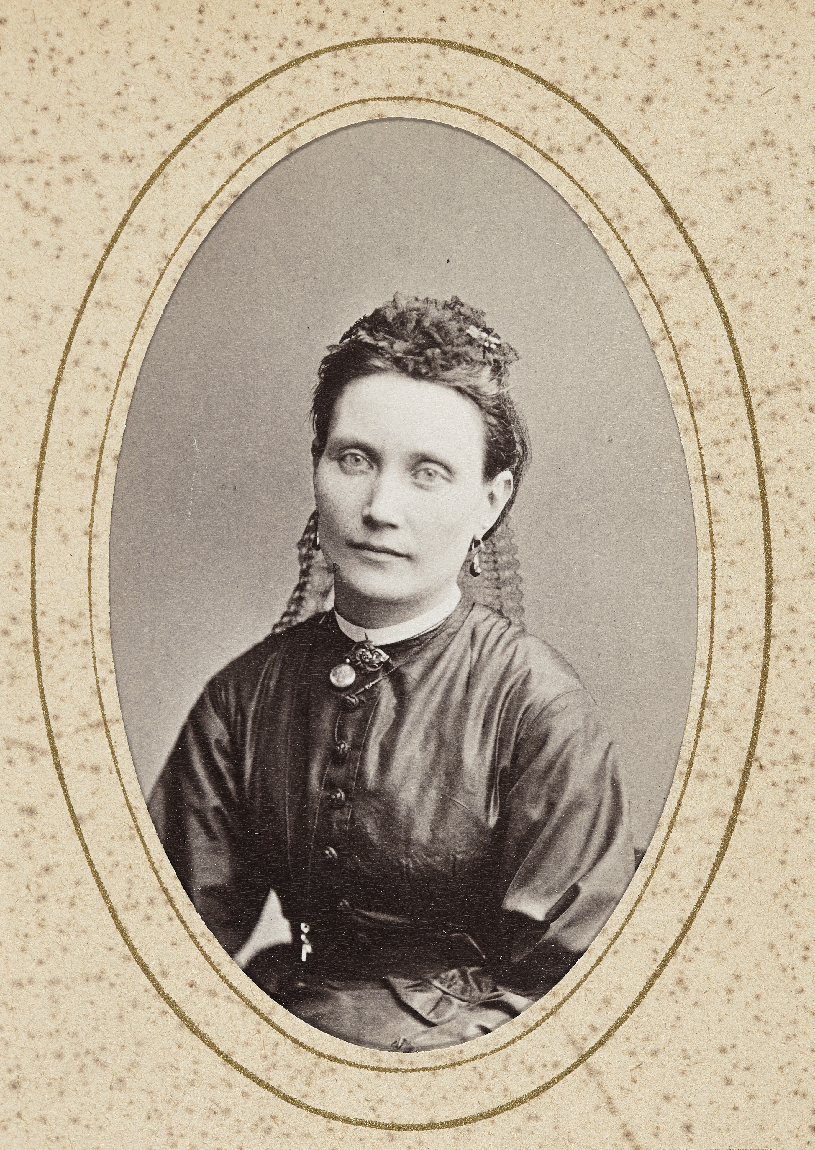 Theodolinda Hahnsson (1938-1919)